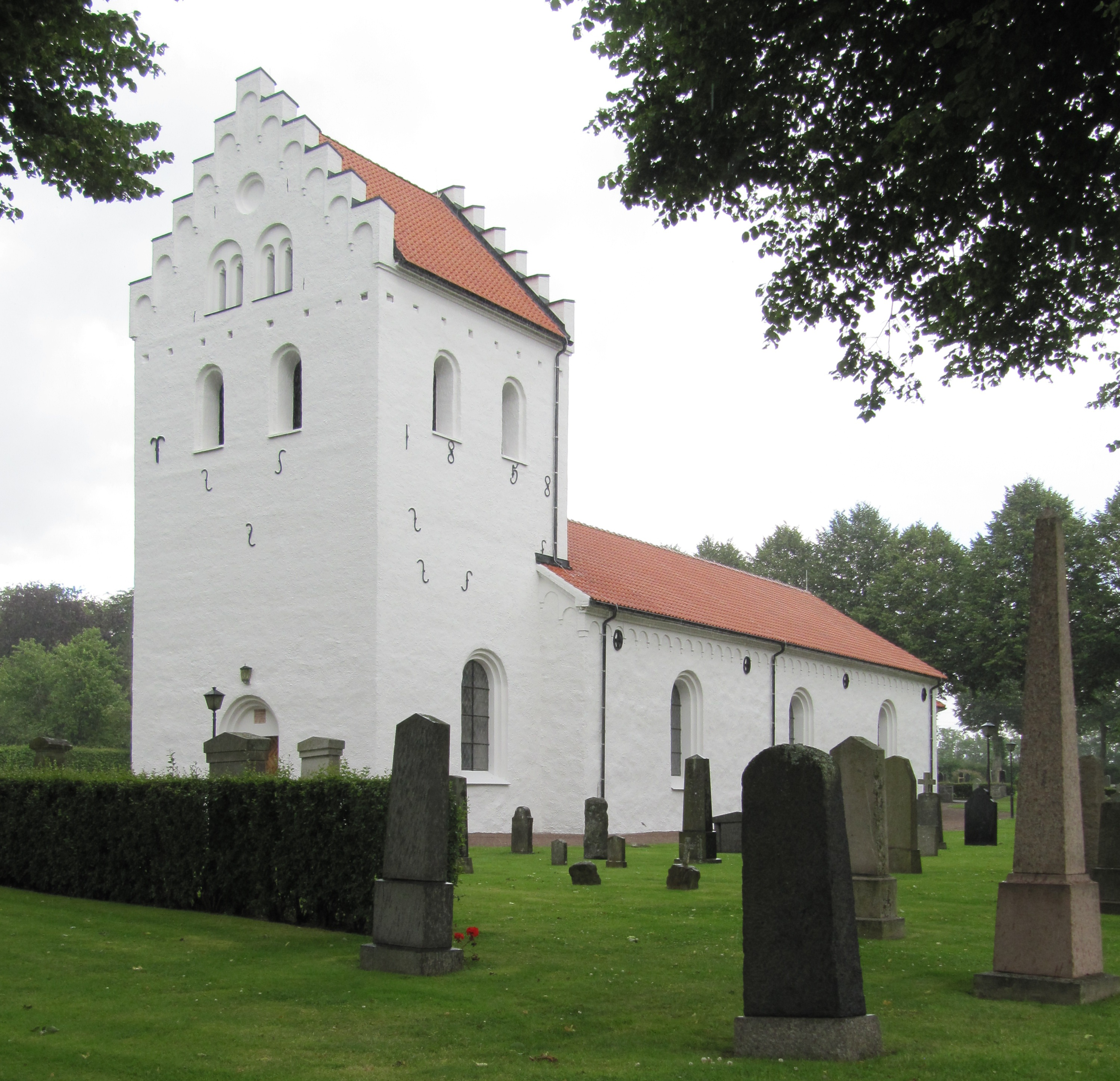 Ausås kyrka från sydväst